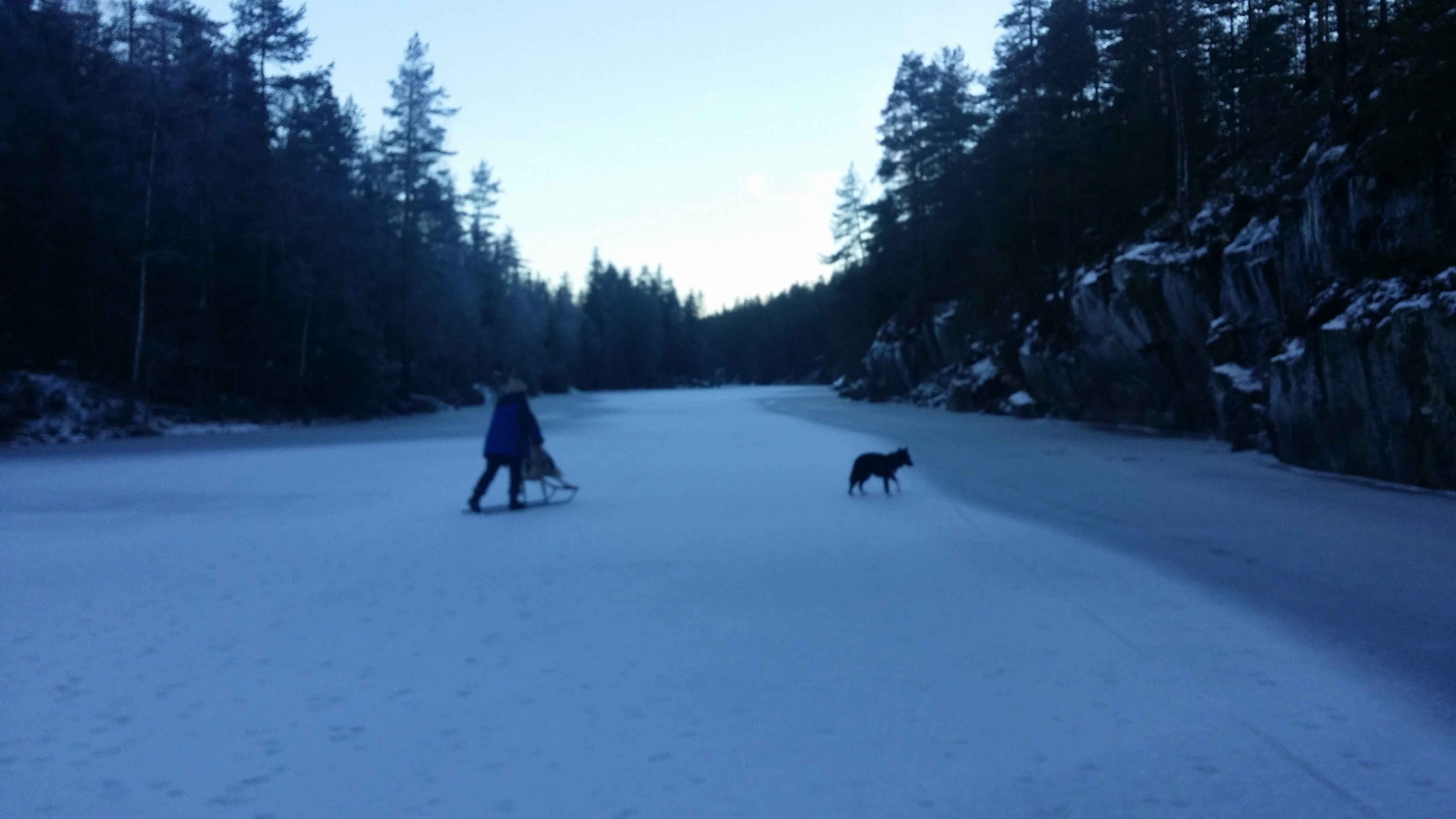 Kjøring med sparkstøtting på Svartoren.